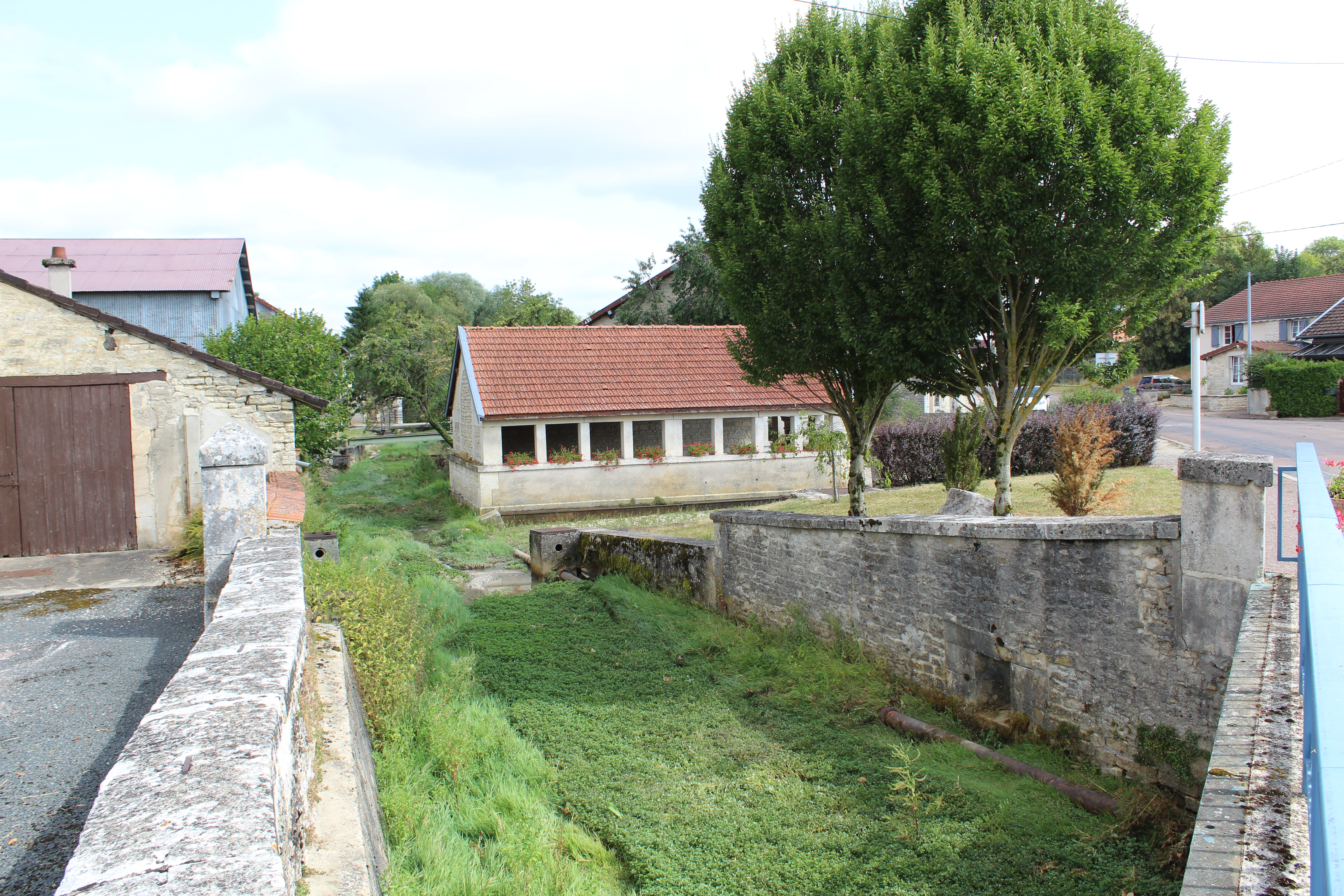 La Blaise.